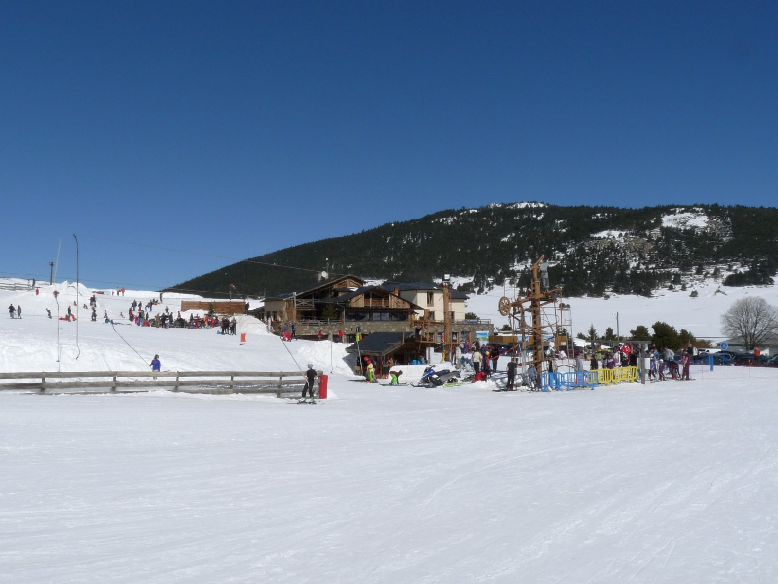 Station de ski de la Quillane, Pyrénées-Orientales, France